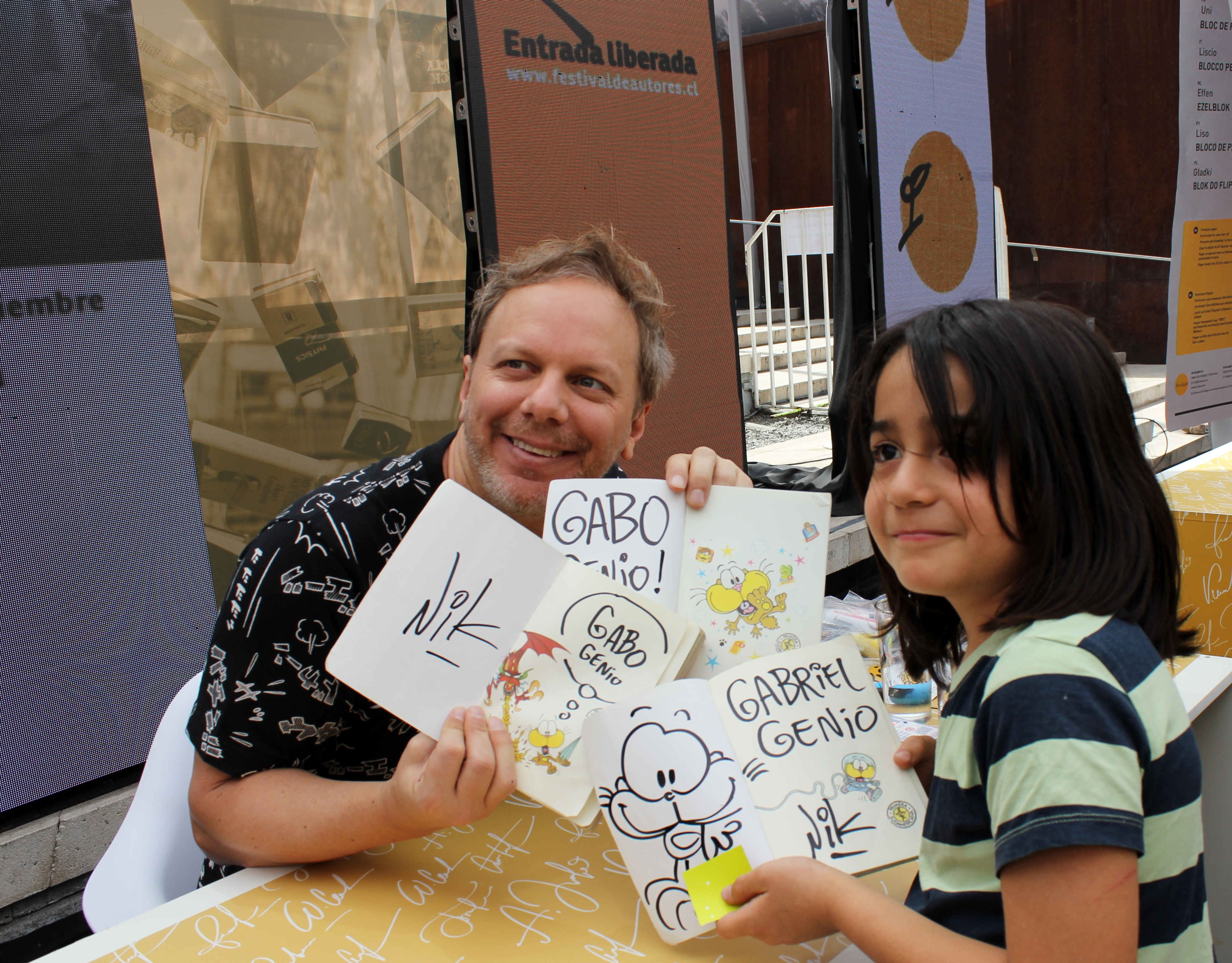 El historietista argentino Nik durante una sesión de firmas en la segunda etapa del Festival de Autores de Santiago 2018 realizada en el GAM.